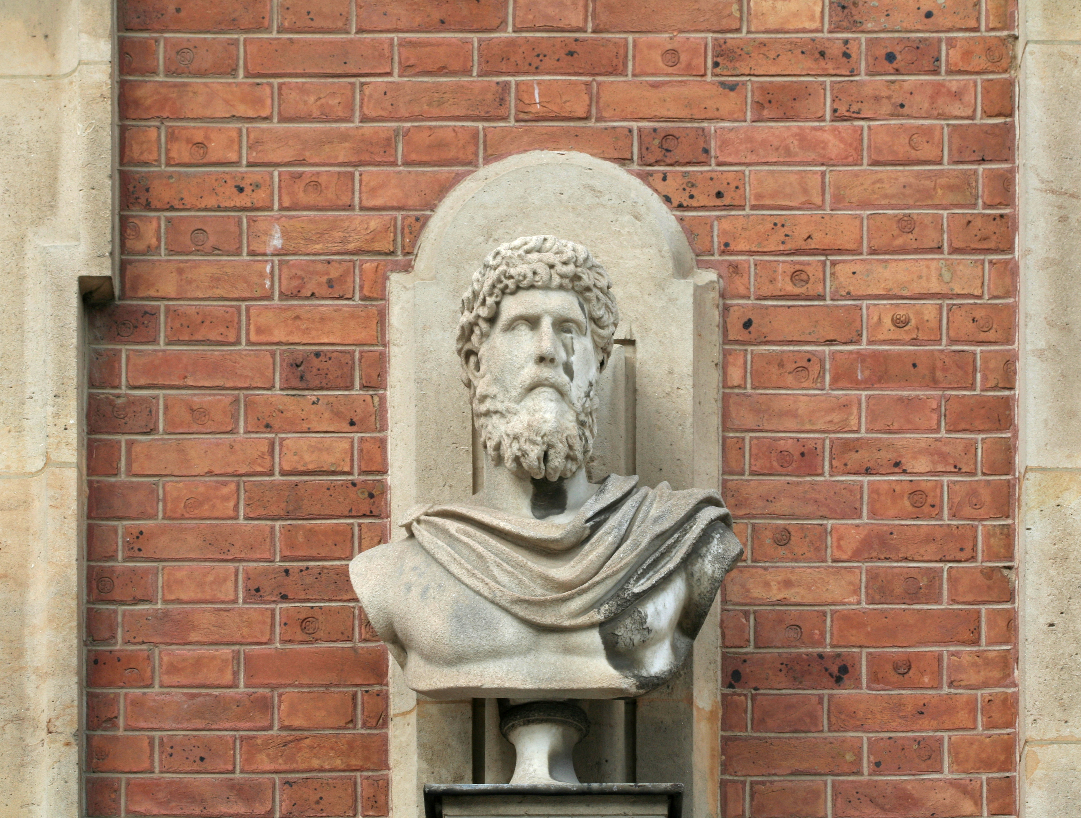 Château de Versailles, cour royale, buste de Lucius Verus. Numéro d'inventaire : Vdse 144